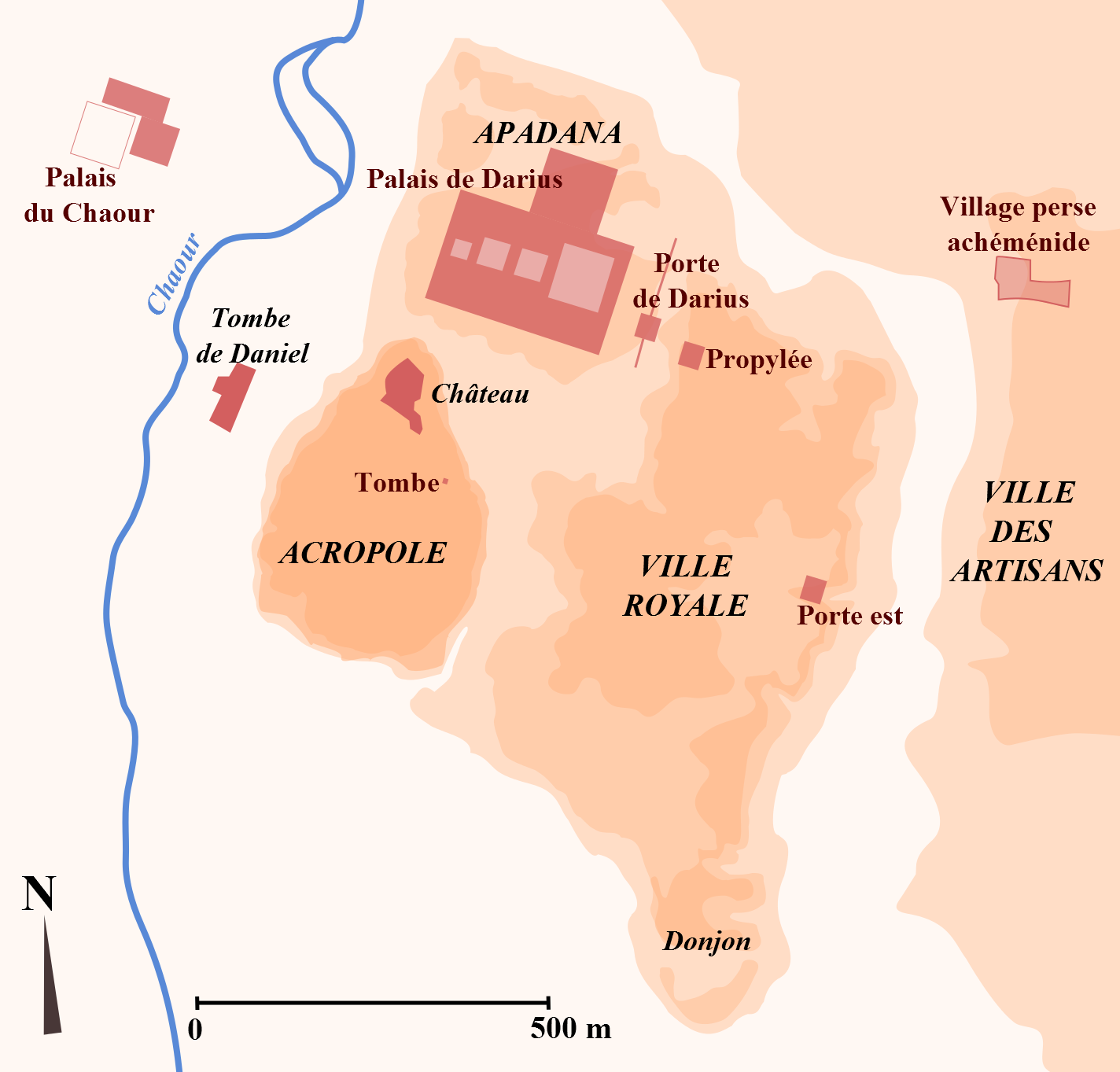 Localisation des principales zones de fouilles de Suse pour la période achéménide.